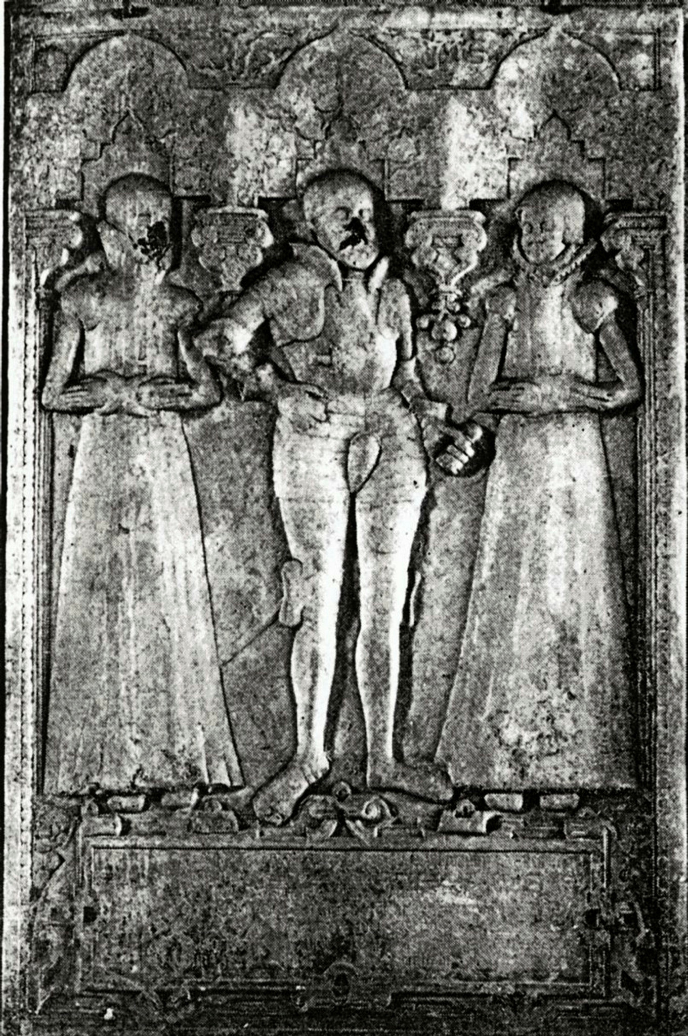 Christen Munk og hustruene Else Truidsdatter Ulfstand og Dorothea Mogensdatter Gyldenstiernes ilksten i Aarhus Domkirke